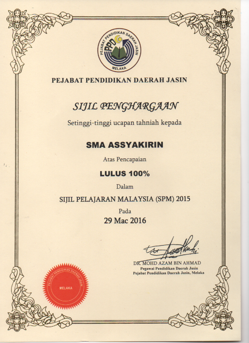 Sijil Penghargaan Cemerlang SPM 2015